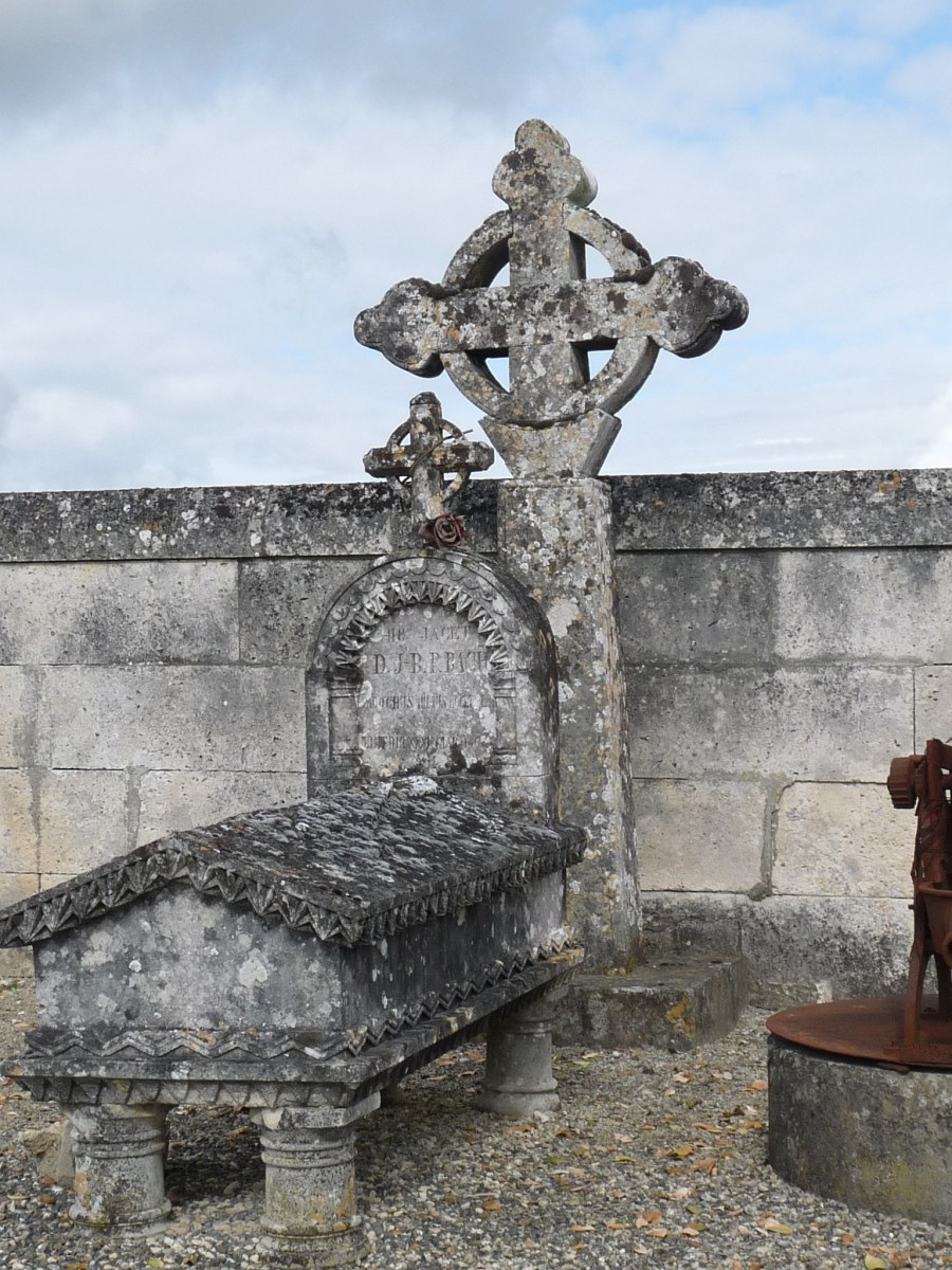 Croix, cimetière de Barret, Charente, France